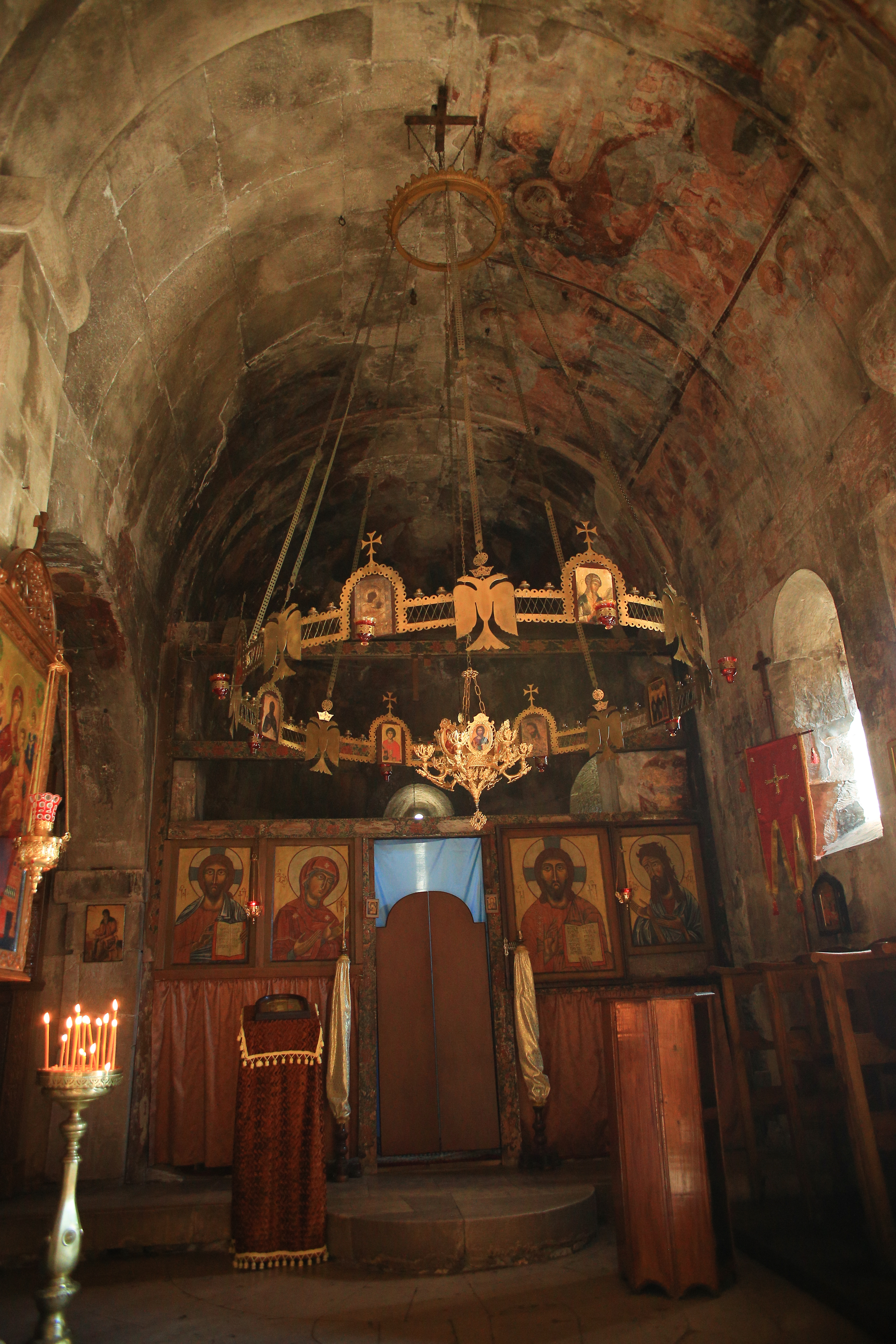 მღვიმევის მონასტერი — ღვთაების ეკლესია